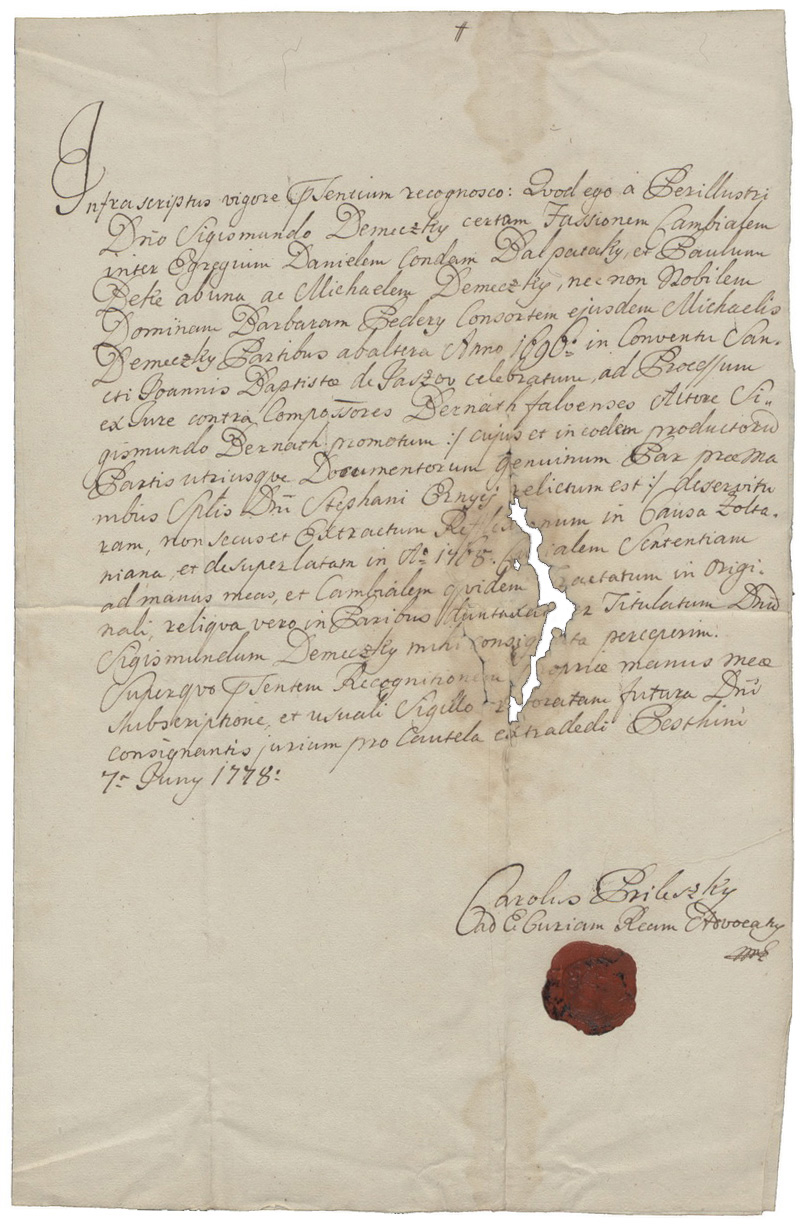 Súdny spíš napísaný Karolom Príleským